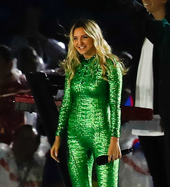 Rio de Janeiro - Cerimônia de encerramento dos Jogos Olímpicos Rio 2016, no Maracanã (Fernando Frazão/Agência Brasil)